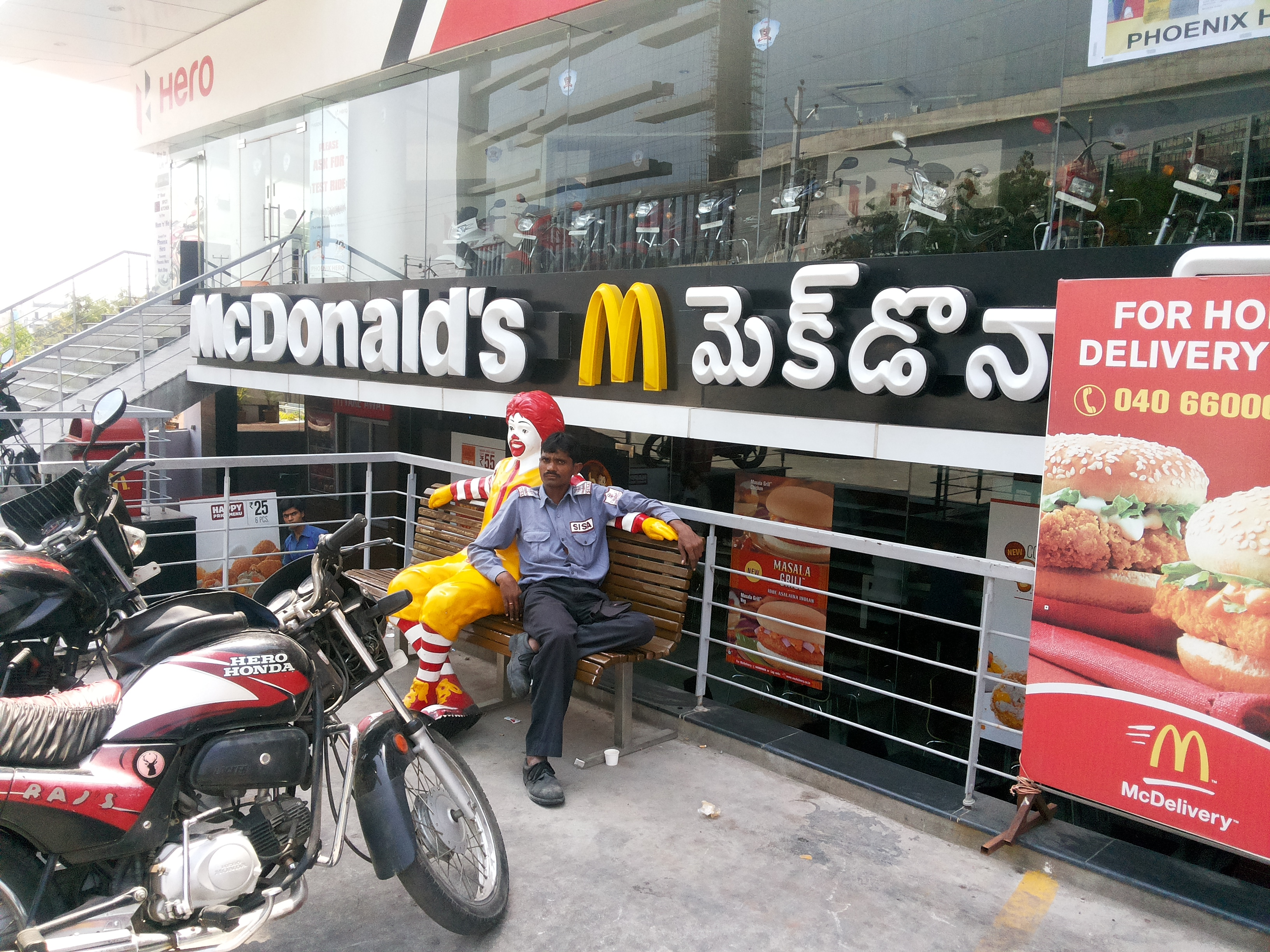 mcD